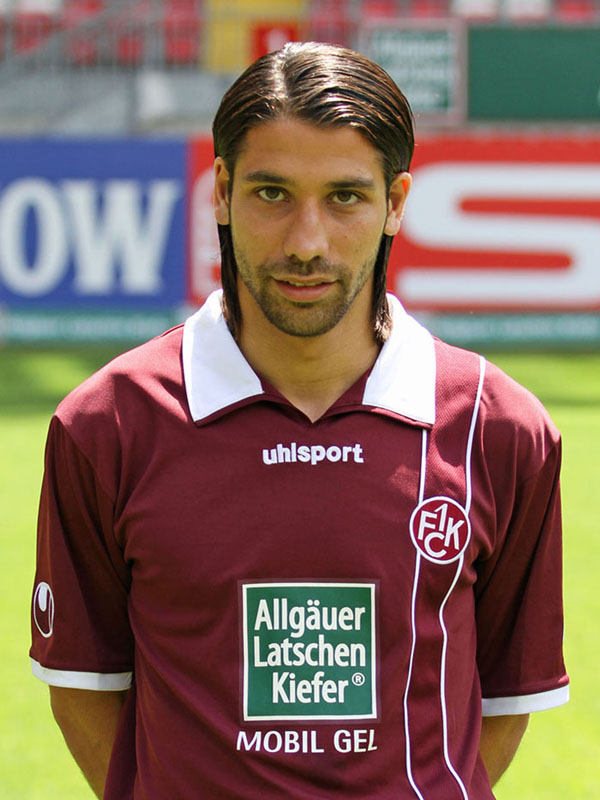 Olcay Sahan, Fußballspieler